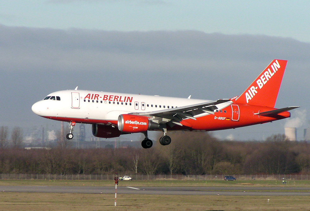 Air Berlin Airbus A319-100 (D-ABGF) in Düsseldorf (EDDL/DUS)